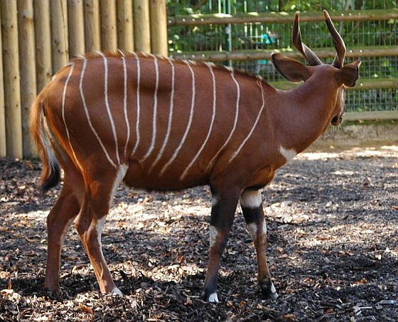 Bongo (Tragelaphus eurycerus) seitlich